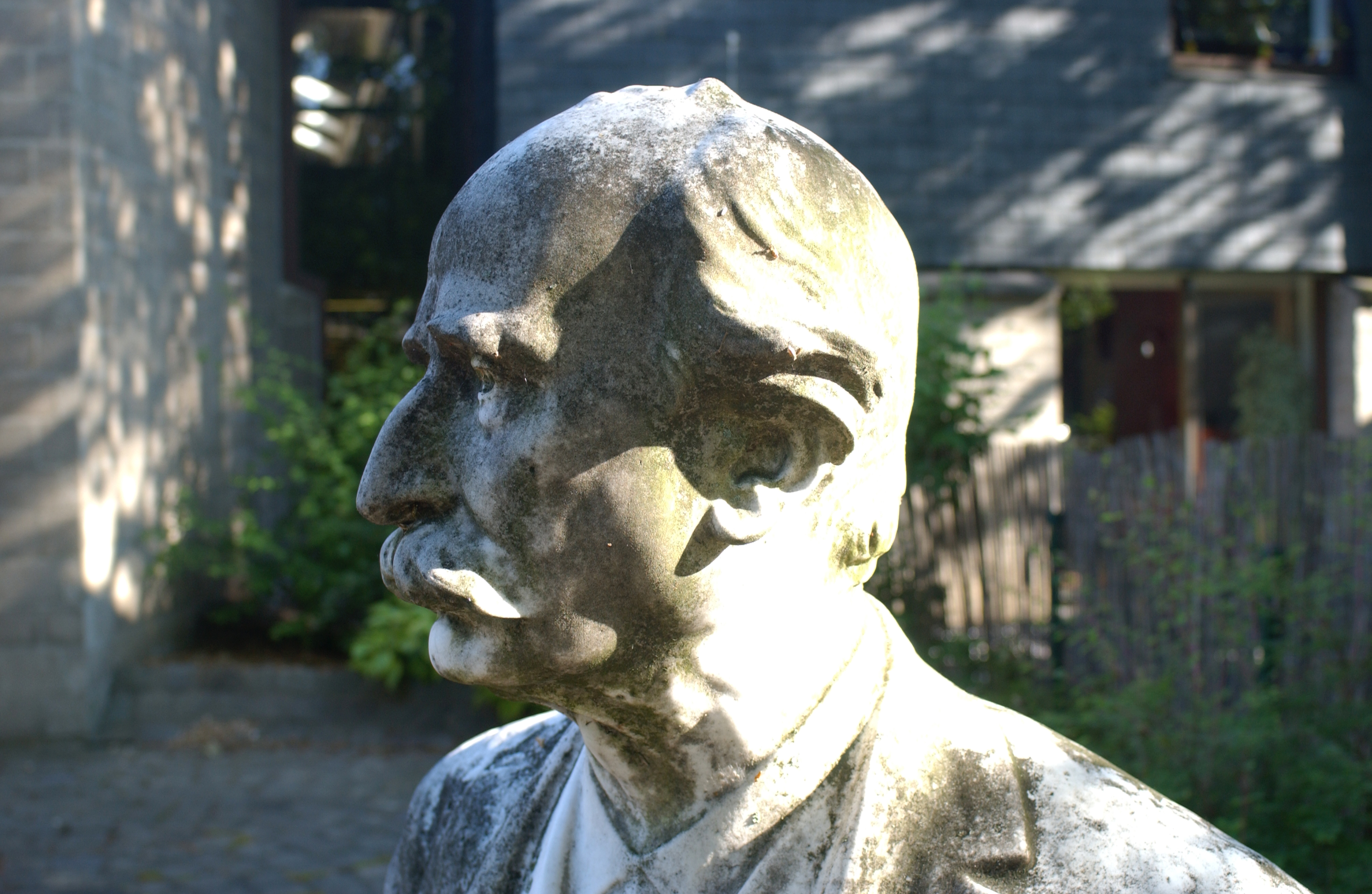 Thomas Vinçotte, "Buste de Georges Montefiore-Levi", 1904, Université de Liège.